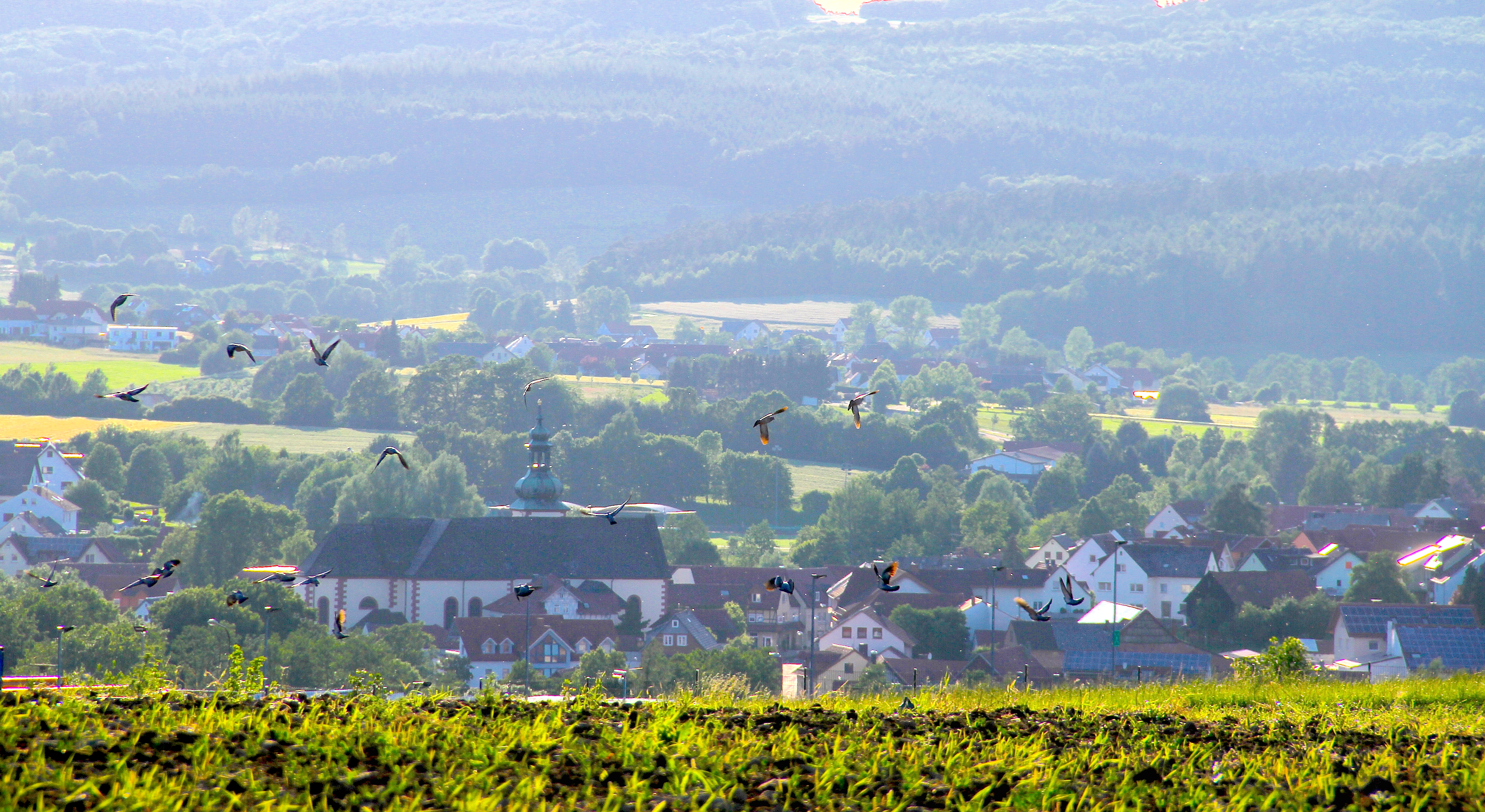 Ort Flieden in der Gemeinde Flieden (vom Eisenküppel aus gesehen)